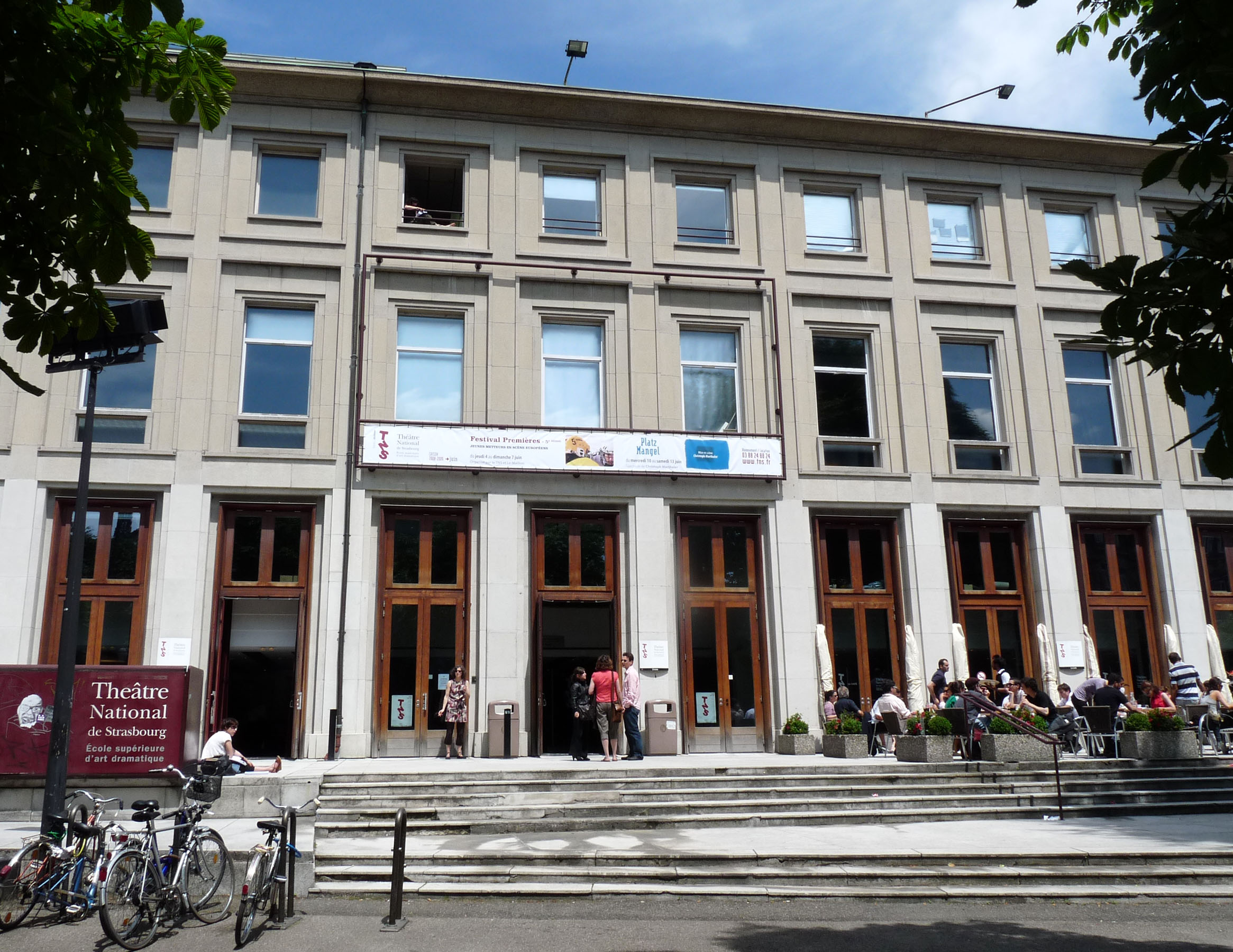 Ecole supérieure d'art dramatique à Strasbourg